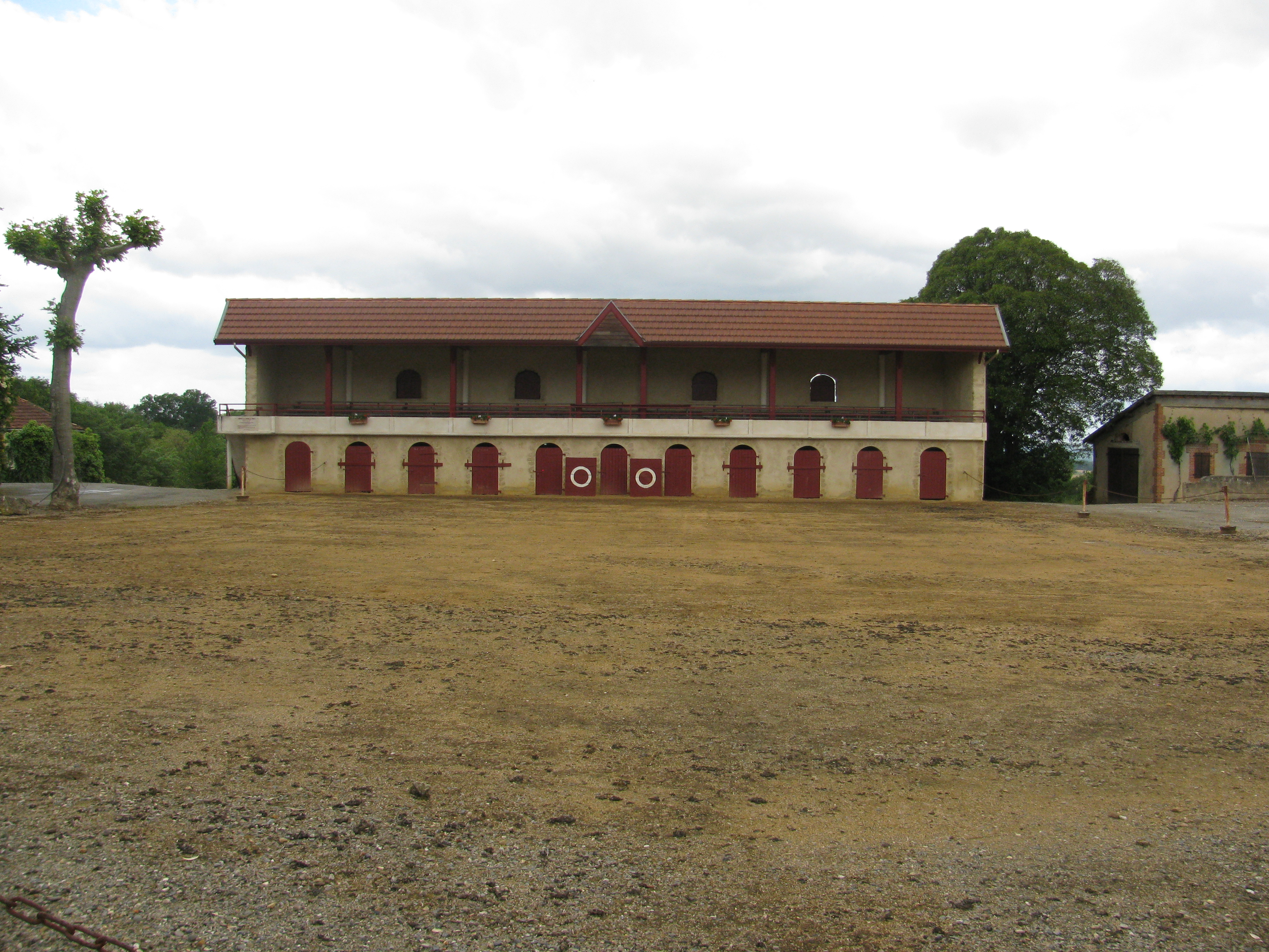 arène de Viella